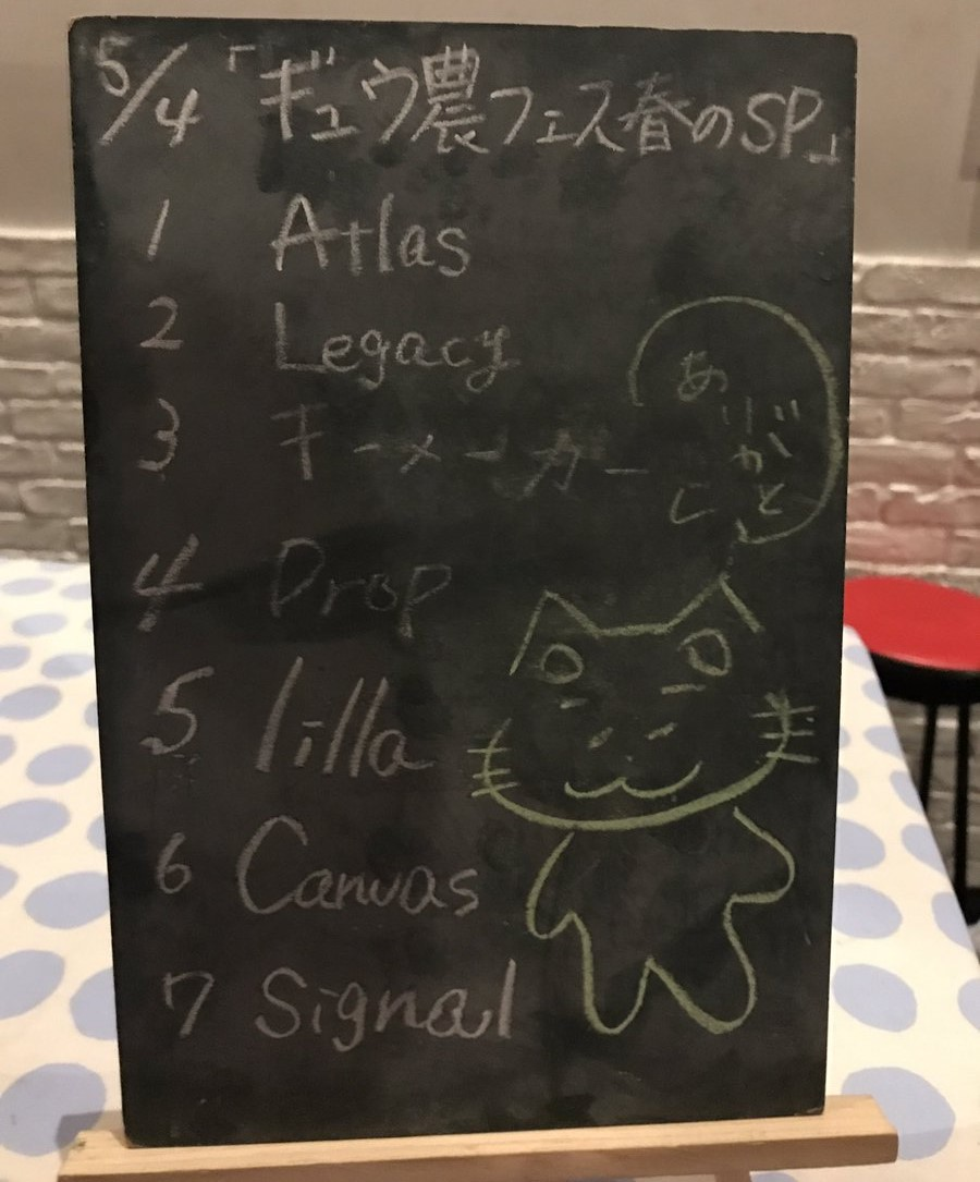 amiinAセトリボード(20170504(1))